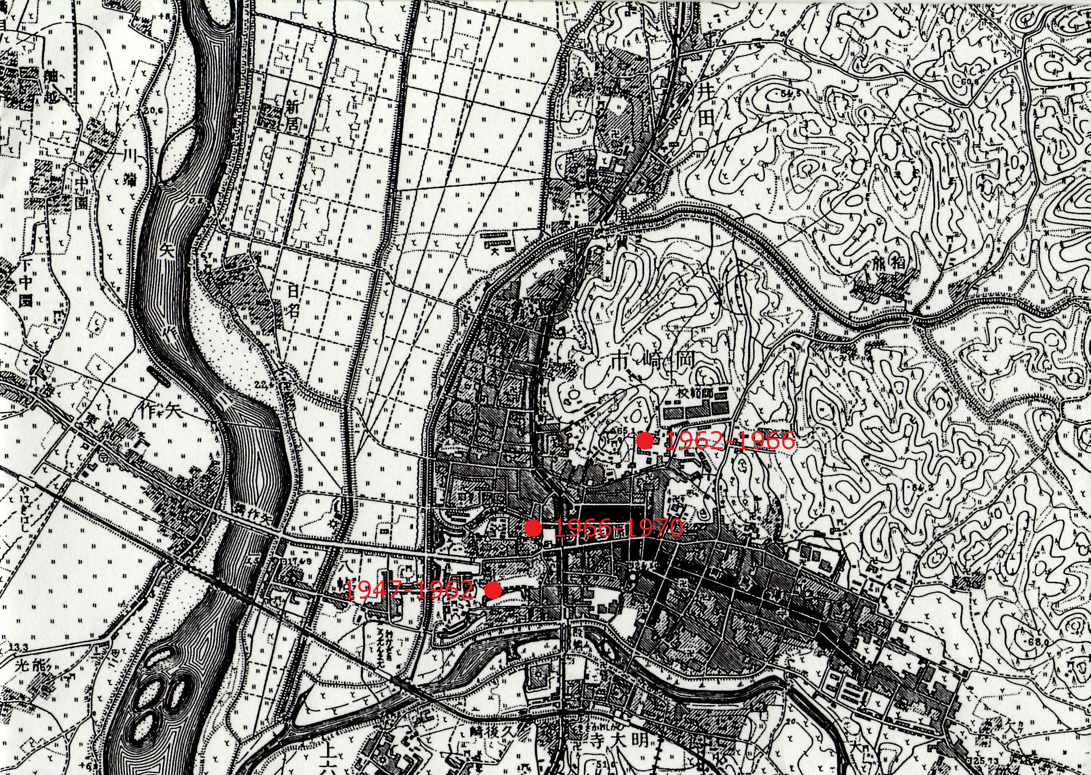 1947年から1970年、岡崎市立図書館が3館を転々としていた頃。